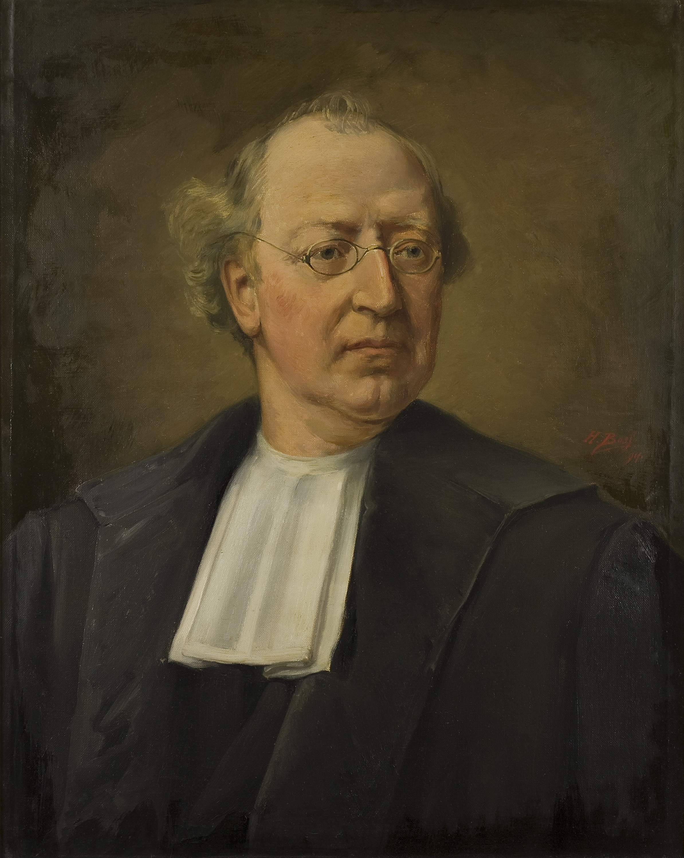 Tjalling Halbertsma J.Hzn., borstbeeld naar links, de kop iets naar rechts. toga, bef; grijzend haar. bril. bruine achtergrond.Postuum geschilderd, naar foto gemaakt door Johan Christiaan Reesinck.